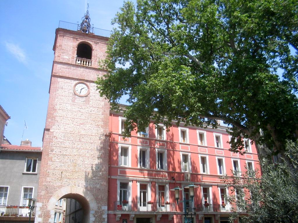 Ancien Hôtel de Ville de Rivesaltes (Pyrénées-Orientales) sur la place Charles de Gaulle